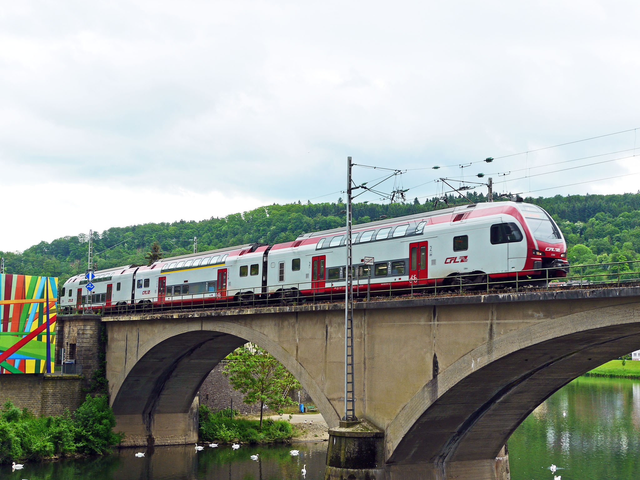 Automotrice type Kiss franchissant la frontière germano-luxembourgeoise à Wasserbillig